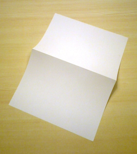 DIN A4 Kopierpapier gefaltet offen liegend